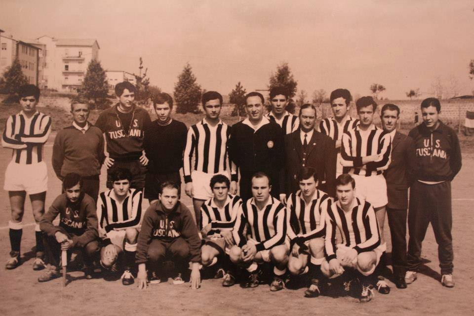 21 Marzo 1968 intitolazione campo sportivo e partita arbitrata da Sbardella.